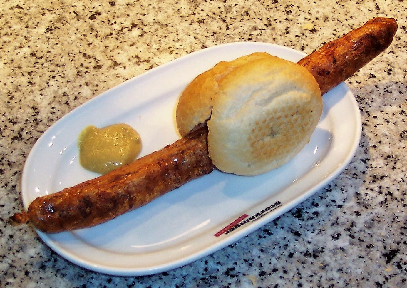 Rostbratwurst mit kleinem Brötchen und Senf als typisches Imbiss-Angebot, hier an einem Bratwurststand in Bremen